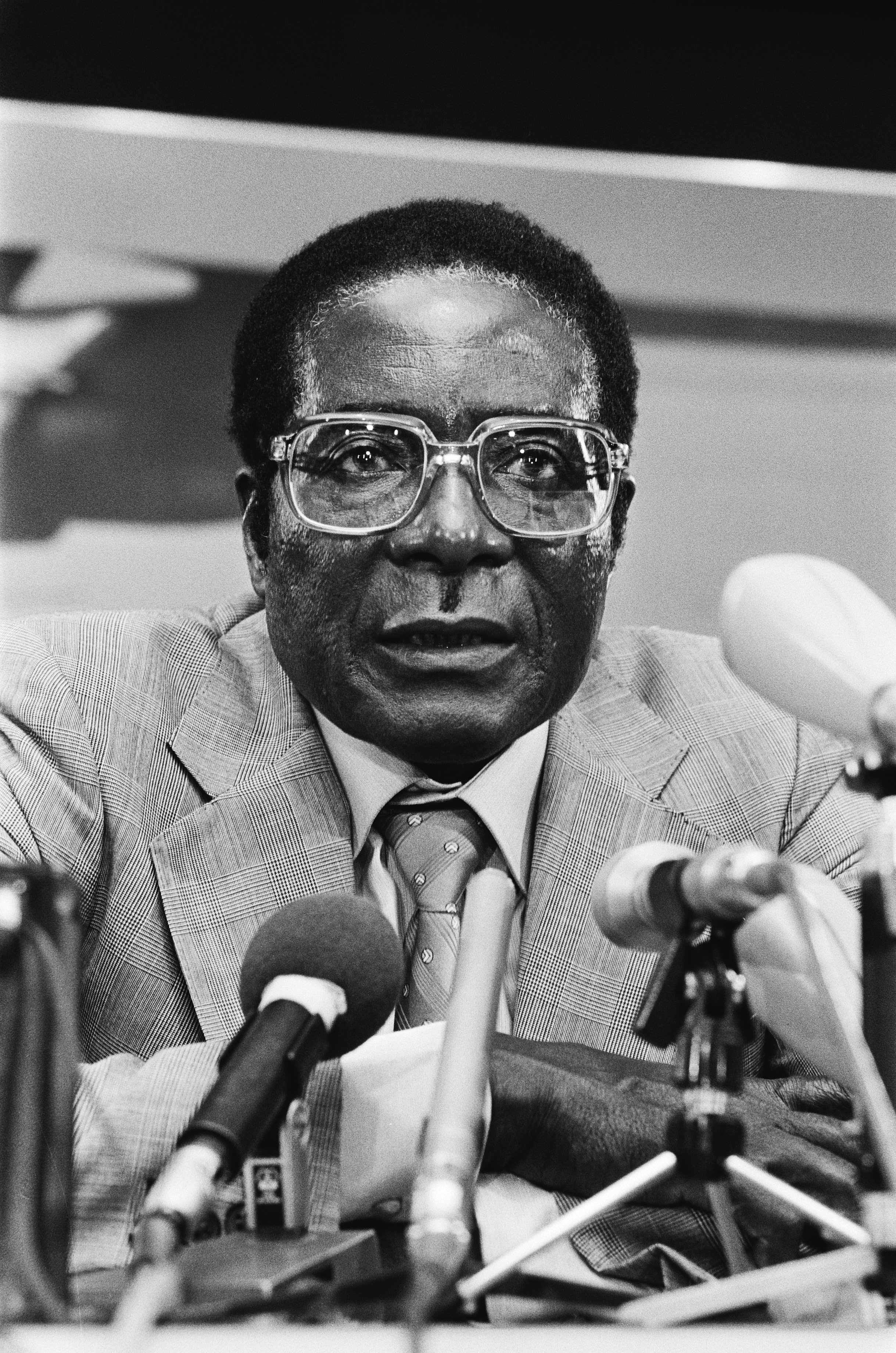 Collectie / Archief : Fotocollectie Anefo Reportage / Serie : [ onbekend ] Beschrijving : Persconferentie Robert Magabe , president Zimbabwe, op Schiphol na driedaags bezoek aan Nederland, kop Datum : 4 juni 1982 Locatie : Noord-Holland, Schiphol Trefwoorden : bezoeken, persconferenties, presidenten Fotograaf : Antonisse, Marcel / Anefo Auteursrechthebbende : Nationaal Archief Materiaalsoort : Negatief (zwart/wit) Nummer archiefinventaris : bekijk toegang 2.24.01.05 Bestanddeelnummer : 932-1958